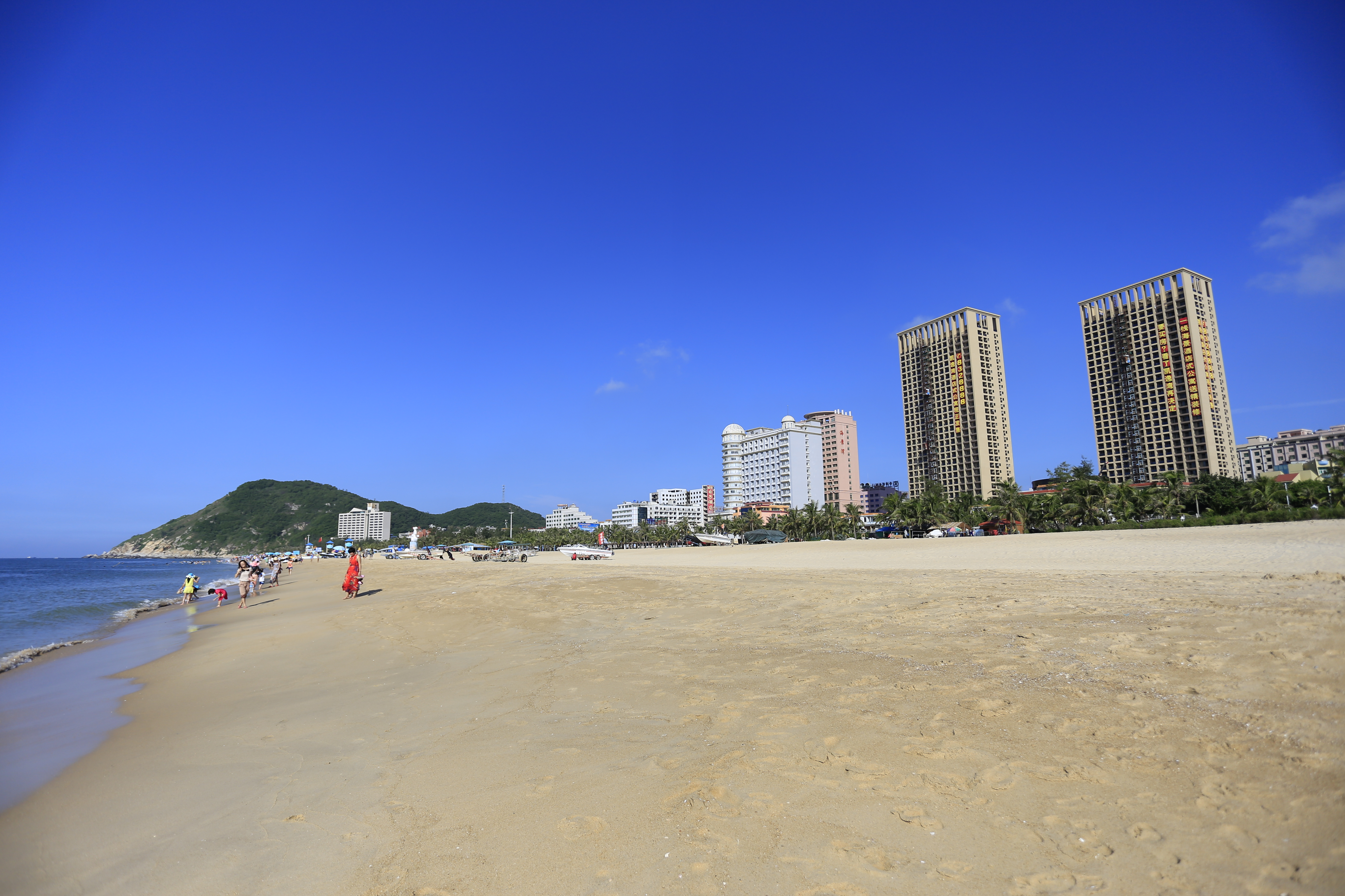 阳江海陵岛大角湾